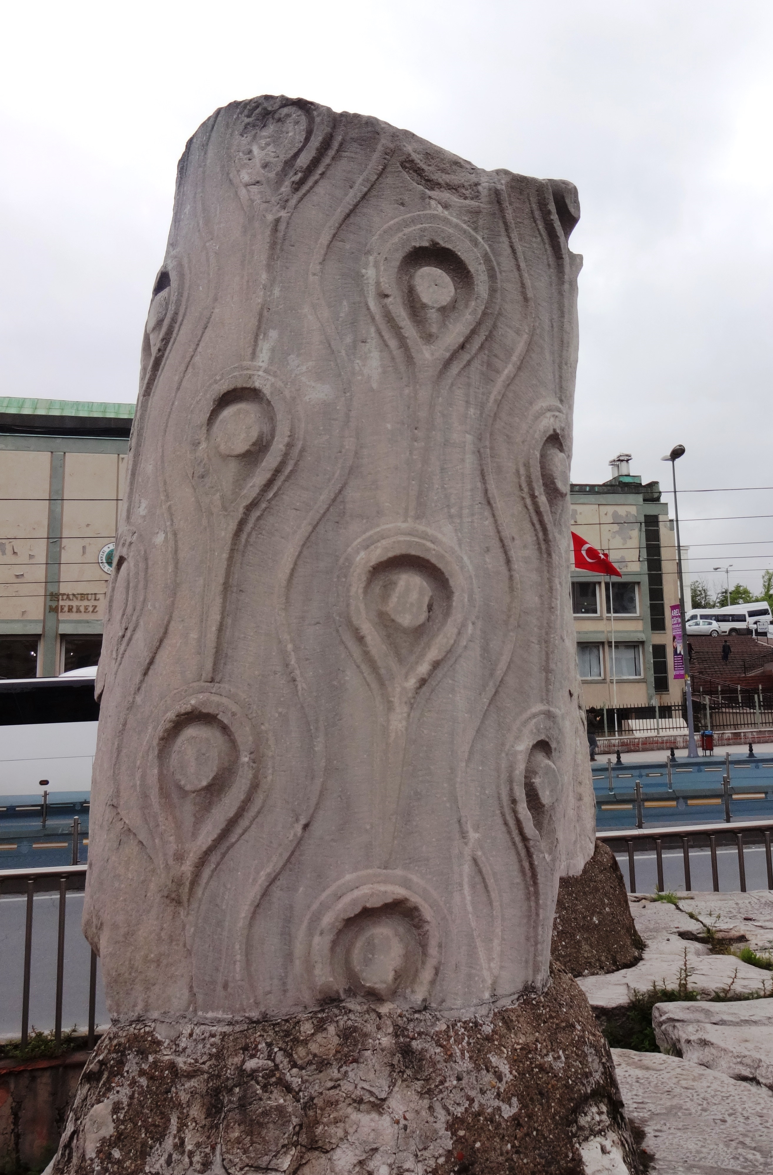 Fragment einer Säule des Theodosiusbogen, Istanbul